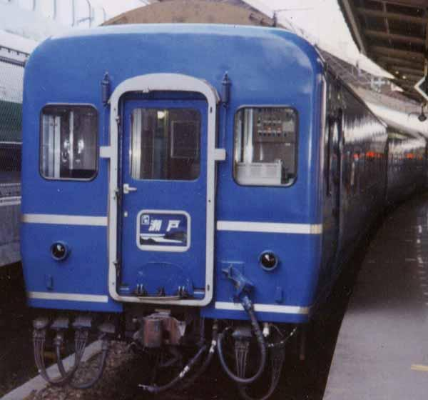 形式 オハネフ25型100番台 JR西日本広島運転所所属（撮影当時） あさかぜ号、瀬戸号用 1993年6月12日 東京駅にて撮影